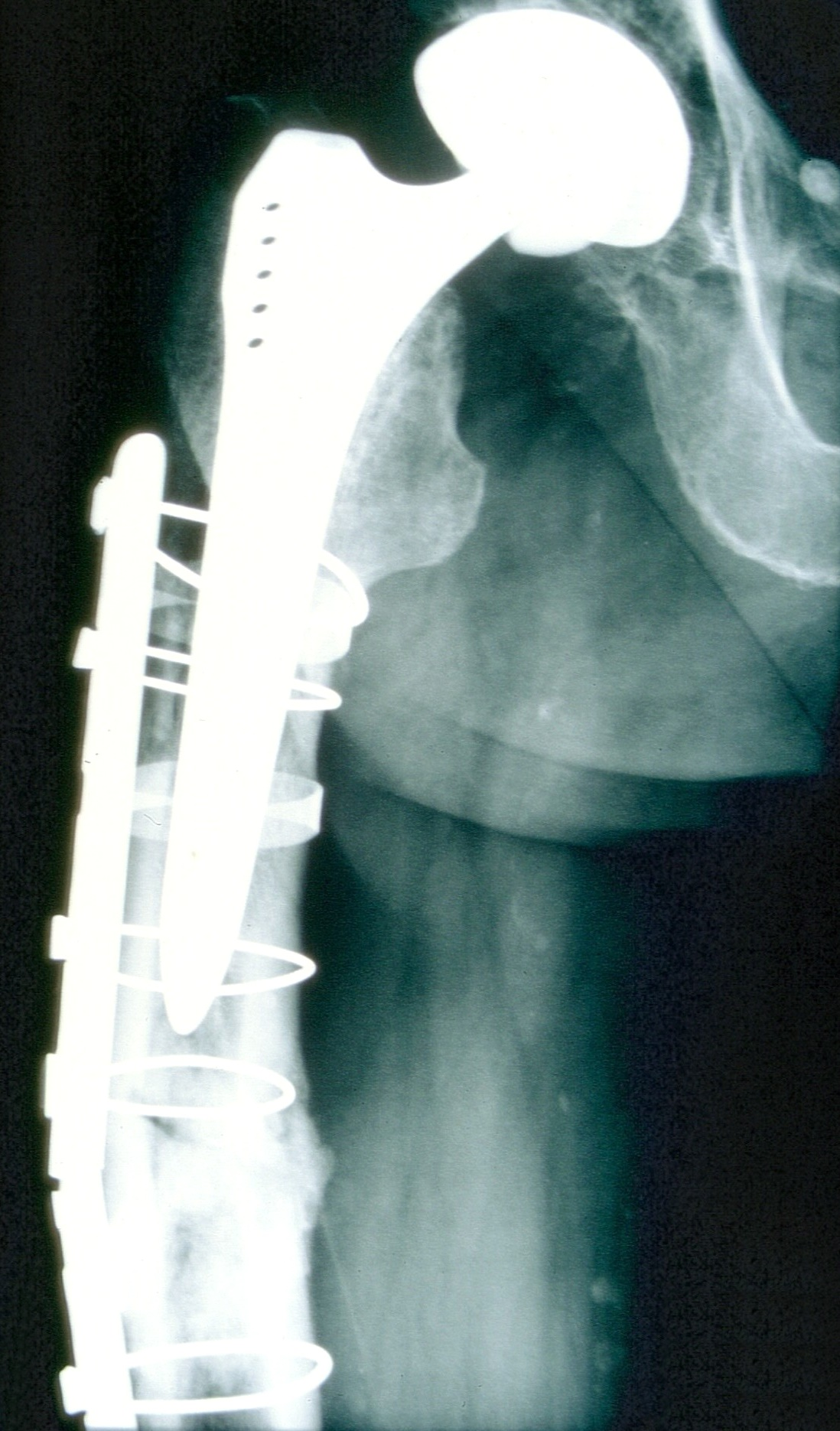 Periprothetische Refraktur des Femurschafts nach zementfreier Totalendoprothese mit Rechteckschaft, vergeblich stabilisiert mit Dall-Miles-Platte.